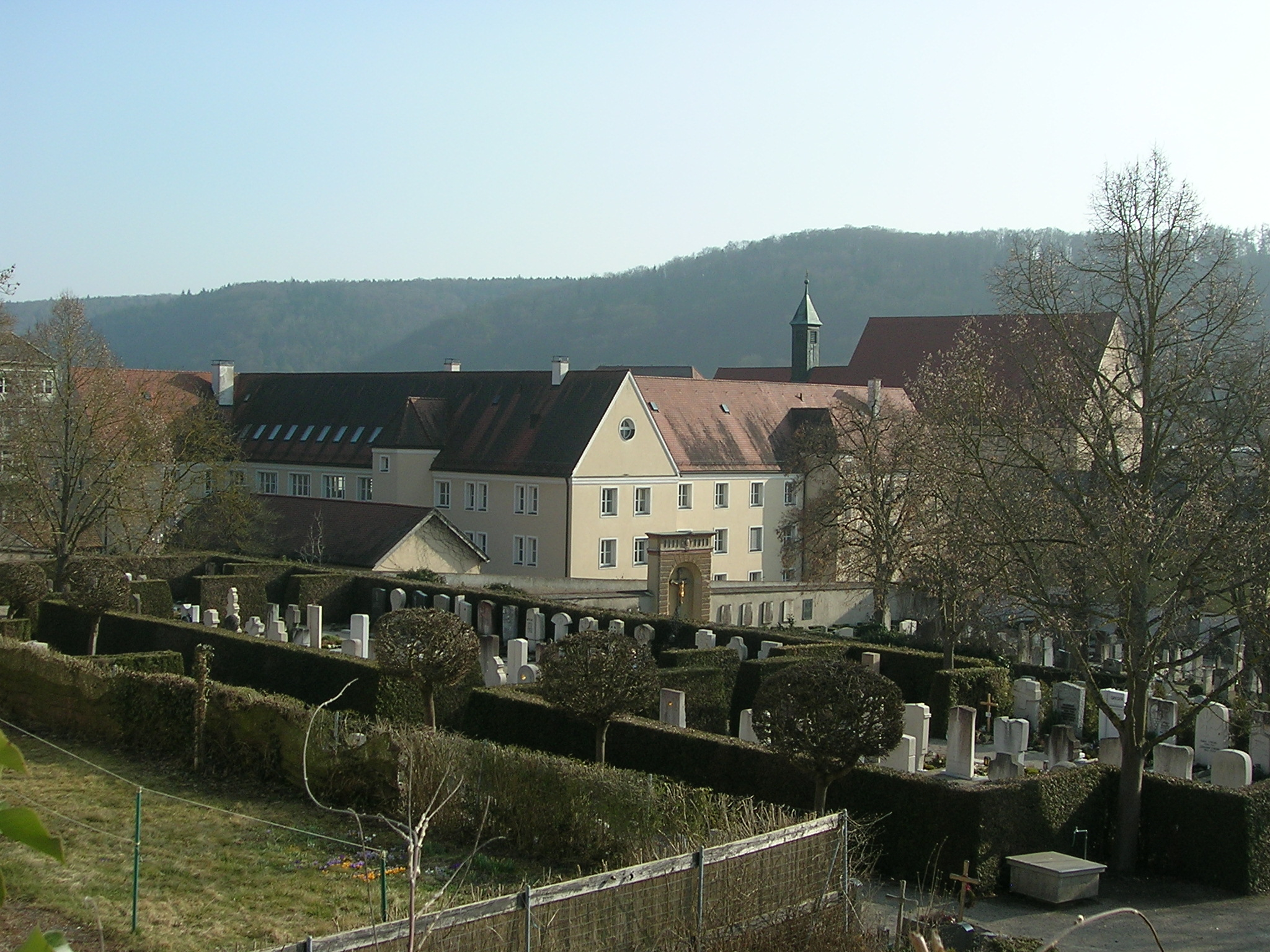 Eichstätt: Blick von Antonistraße über Ostenfriedhof auf Kapuzinerkloster.